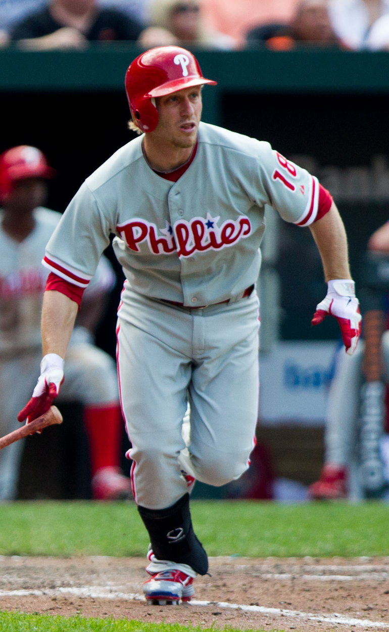 Mike Fontenot